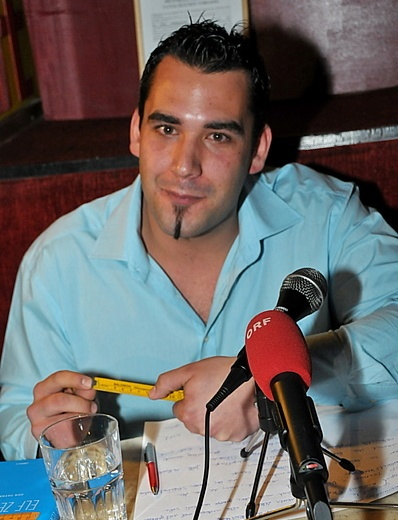 Stefan Scheiblecker bei einer Buchpräsentation im Jahr 2011